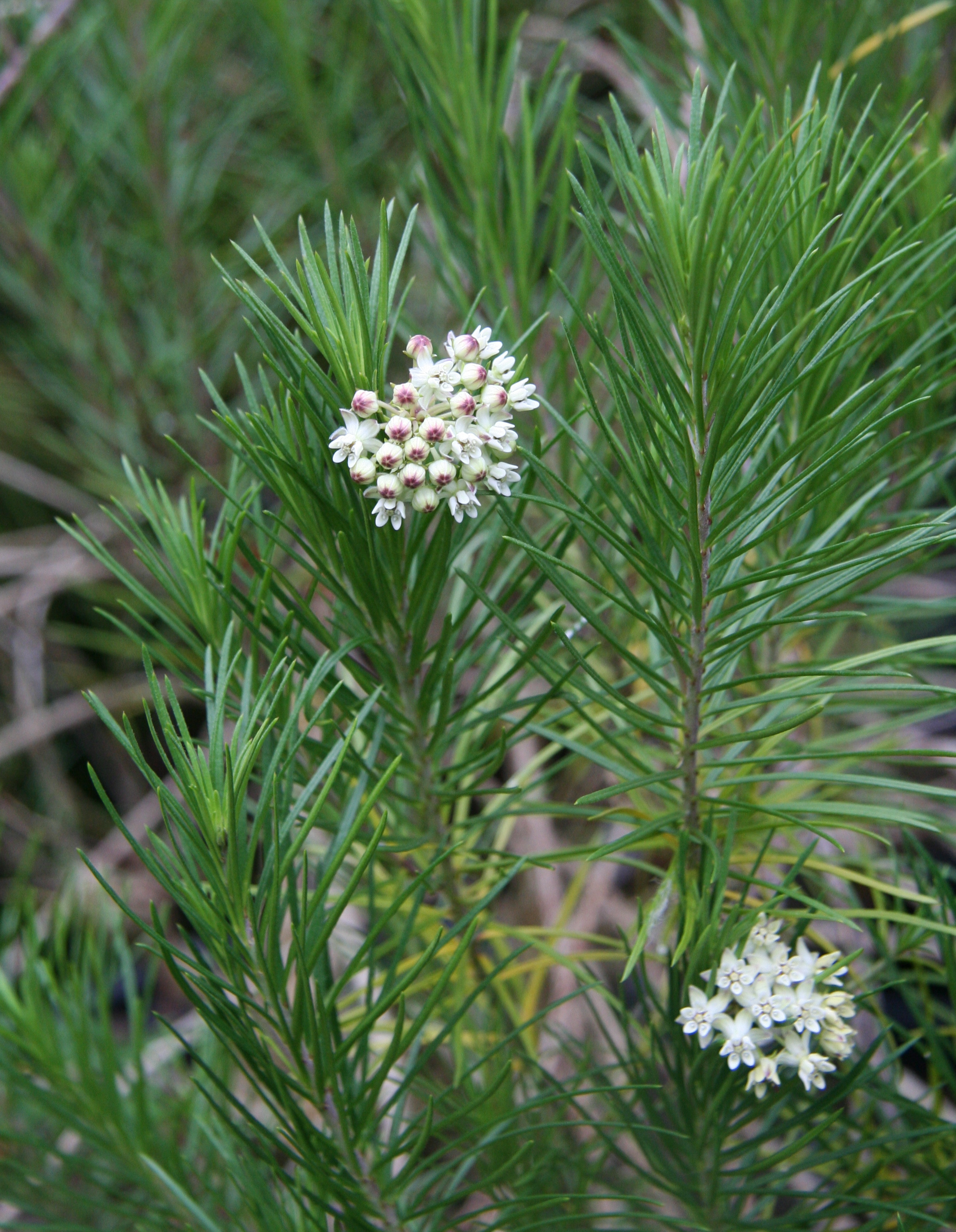 Asclepias linaria im Botanischen Garten Dresden